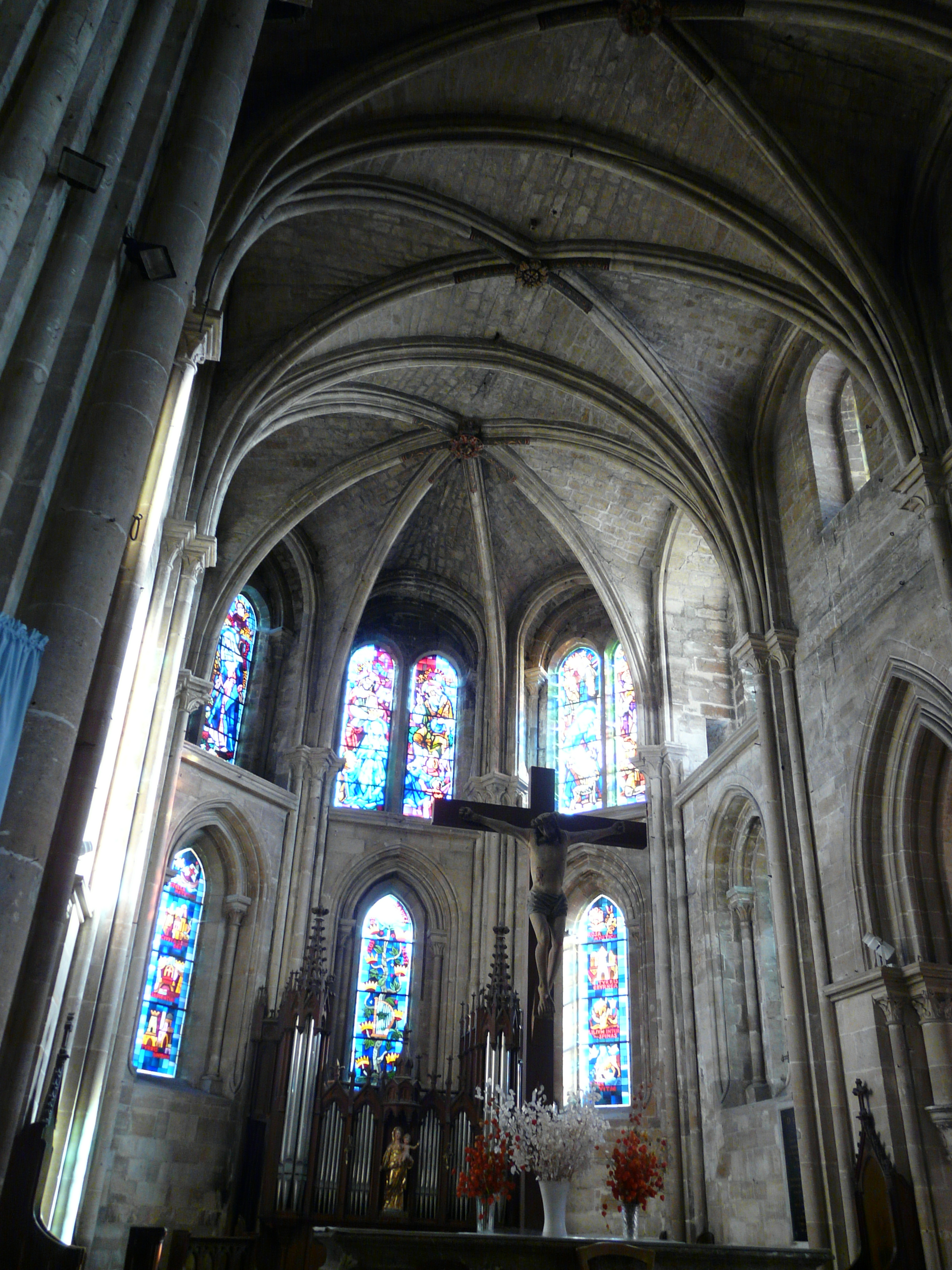 Église Notre-Dame de Bar-le-Duc : le chœur